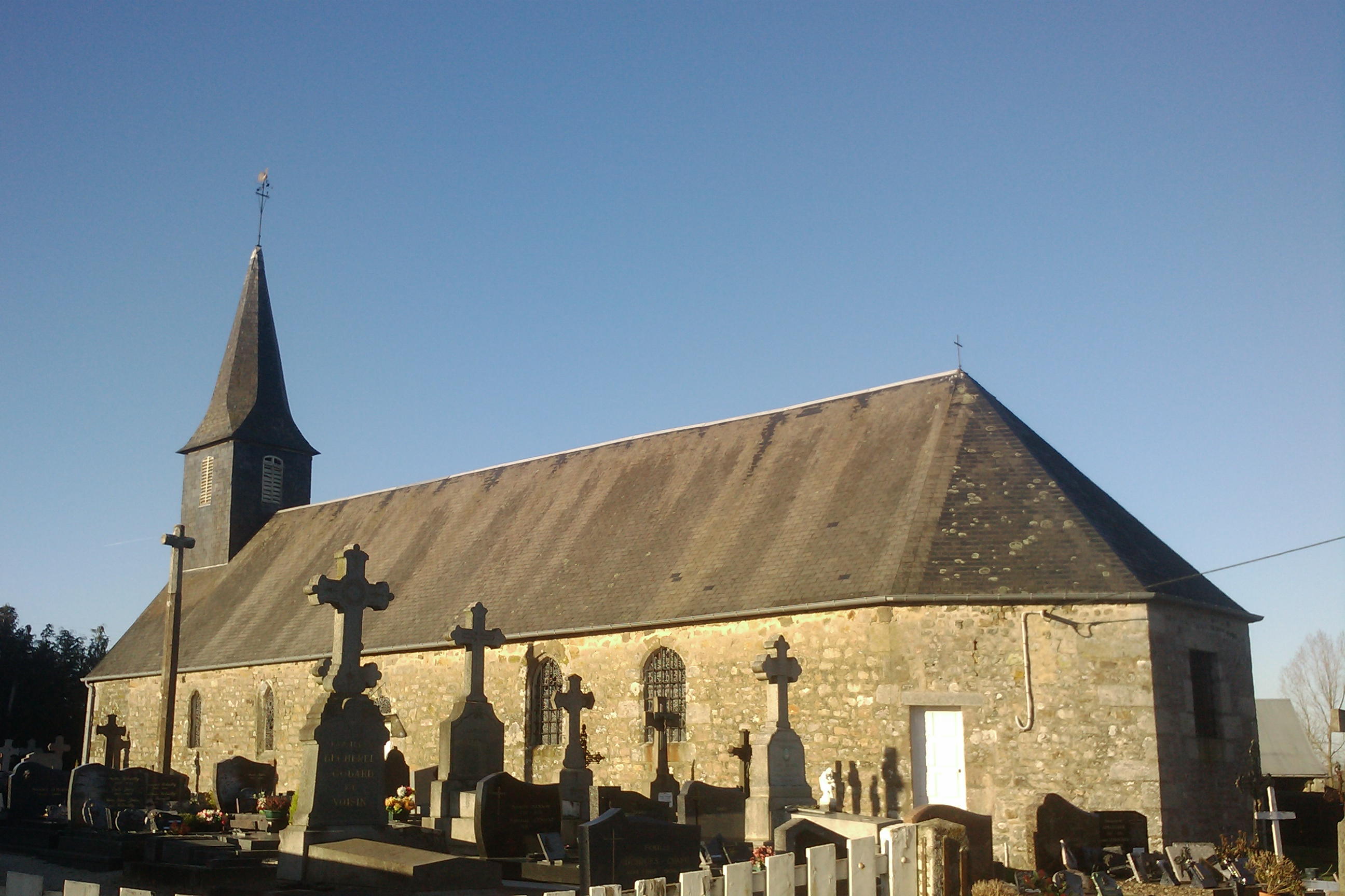 Église Notre-Dame-et-Saint-Gorgon de Margueray